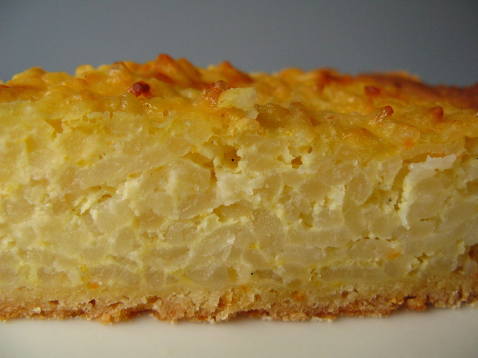 "Close up" di una torta di riso.